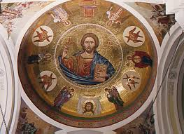 Vista soffitto Icona